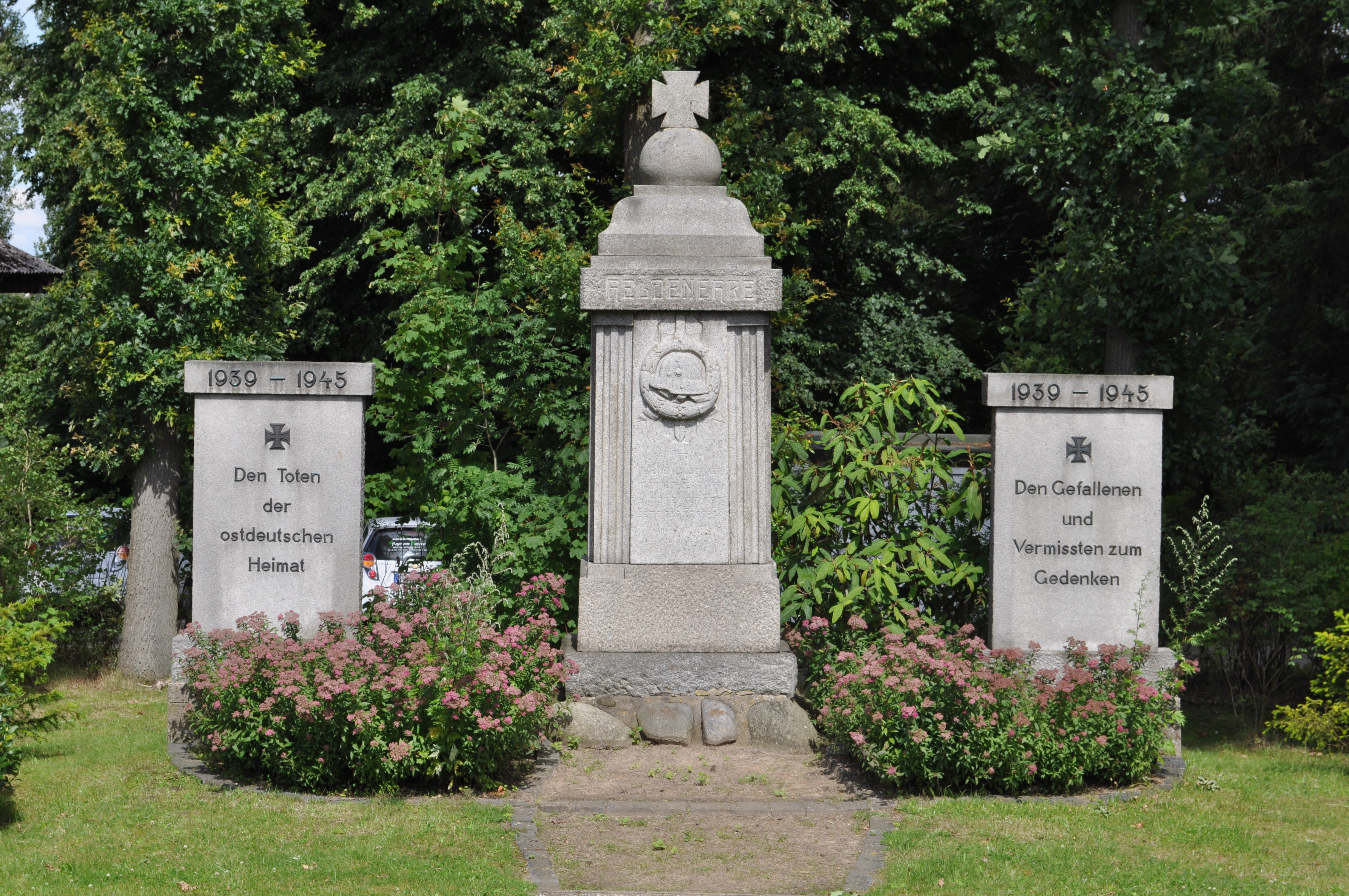 Ehrenmal an der Stader Straße in Hemmoor-Basbeck. This is a photograph of an architectural monument. .202.200.028